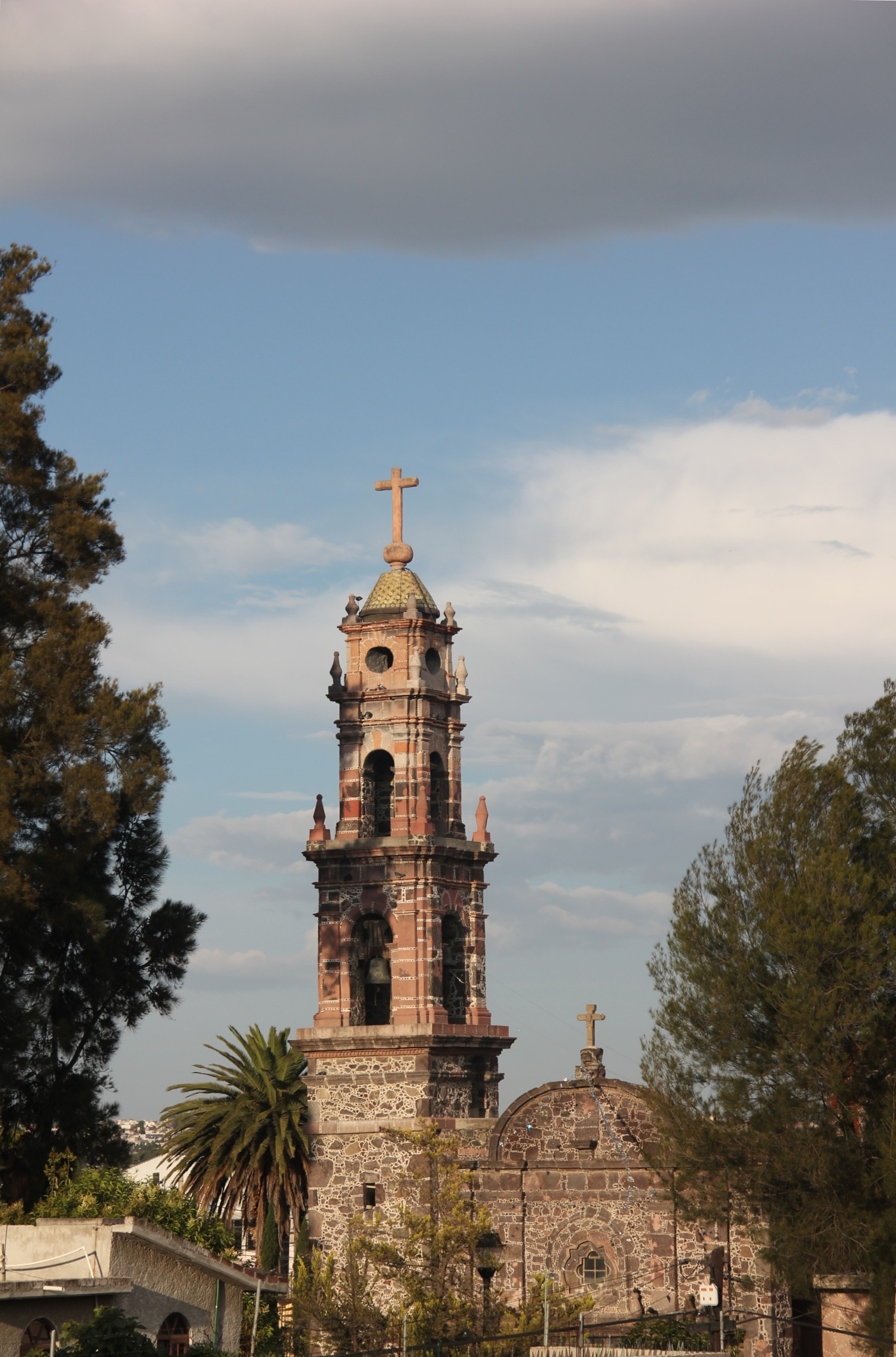 Parroquia de San Pedro Atzompa, Tecámac, Estado de México